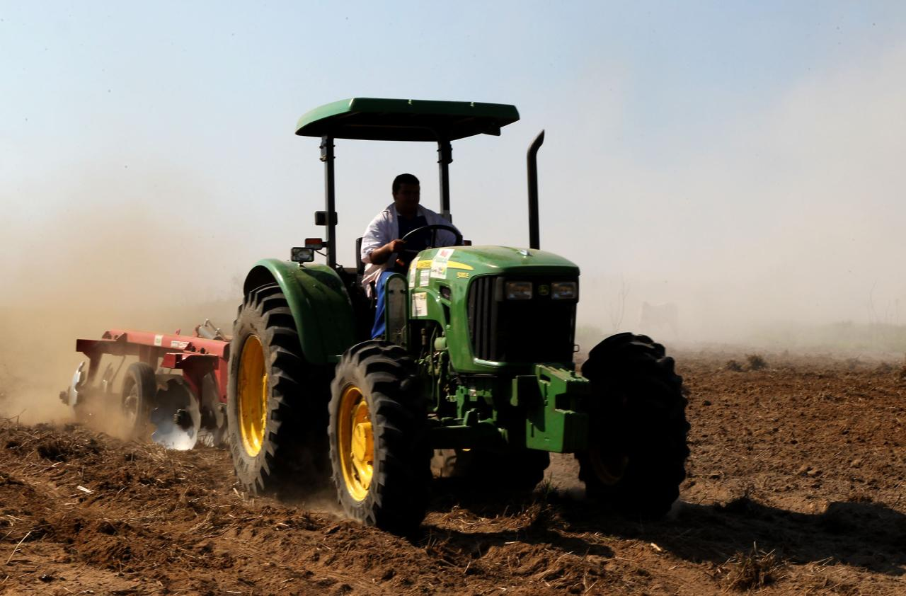 Mancio Lima (Acre) Para proporcionar a elevação da fertilidade dos solos, neutralizar elementos tóxicos e corrigir a acidez do solo, controlando o potencial hidrogeniônico (pH) e com isso, resultar na melhoria da produtividade agrícola, o governador Tião Viana criou o Programa do Calcário que esta sendo executado pela Secretaria de Agricultura e Produção Familiar (Seaprof). A meta é beneficiar produtores rurais como Francisco Dias que confessou que não acreditava que um dia o calcário chegasse a sua propriedade rural pare melhorar o solo e assim, ter mais produção. Fotos: Gleilson Miranda/Secom